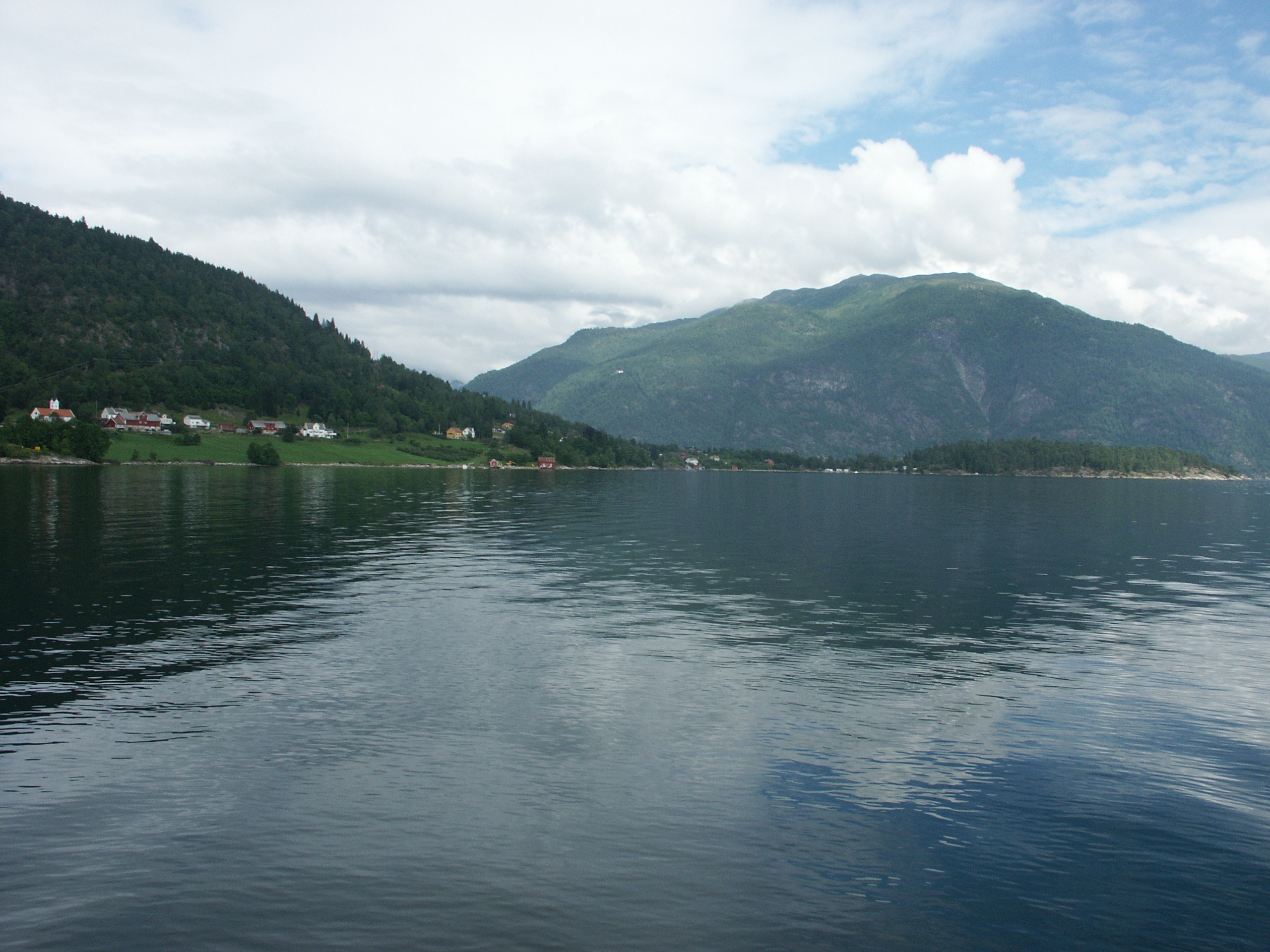 Tjugum ved Esefjorden